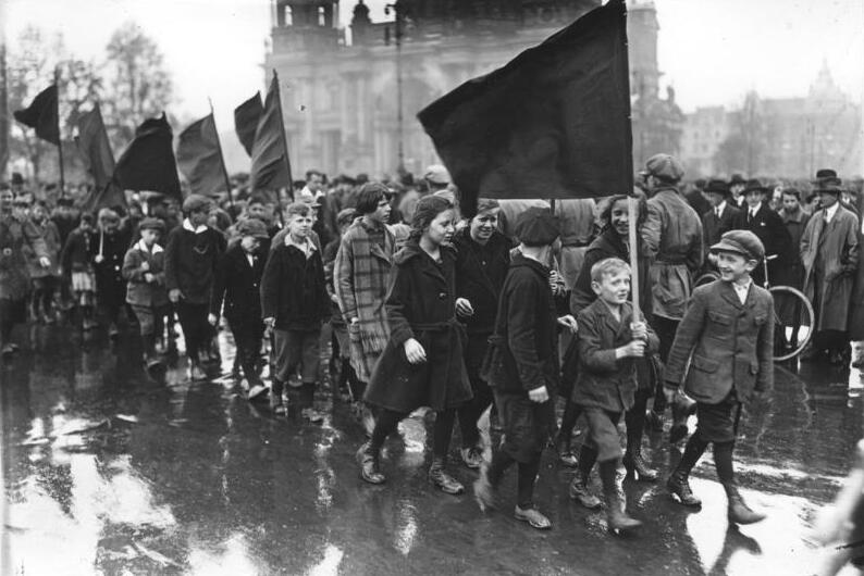 Der 1. Mai in Berlin. Anläßlich des 1. Mai fand in Berlin eine große Demonstration der kommunistischen Partei im Lustgarten statt, welche einen ruhigen Verlauf nahm. Kommunistische Jugend in Demonstrationszuge. 1. Mai 1925